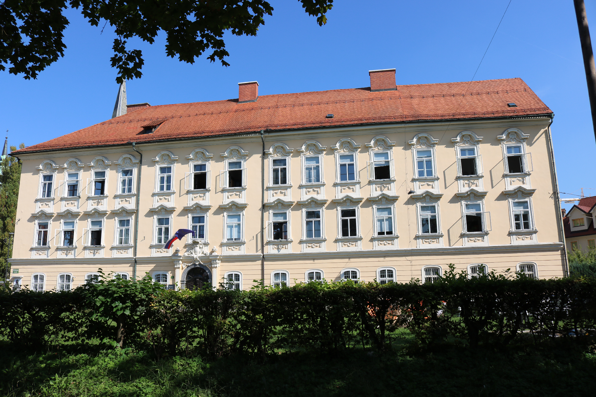 Sedež Arhiva Republike Slovenije, Grubarjeva palača